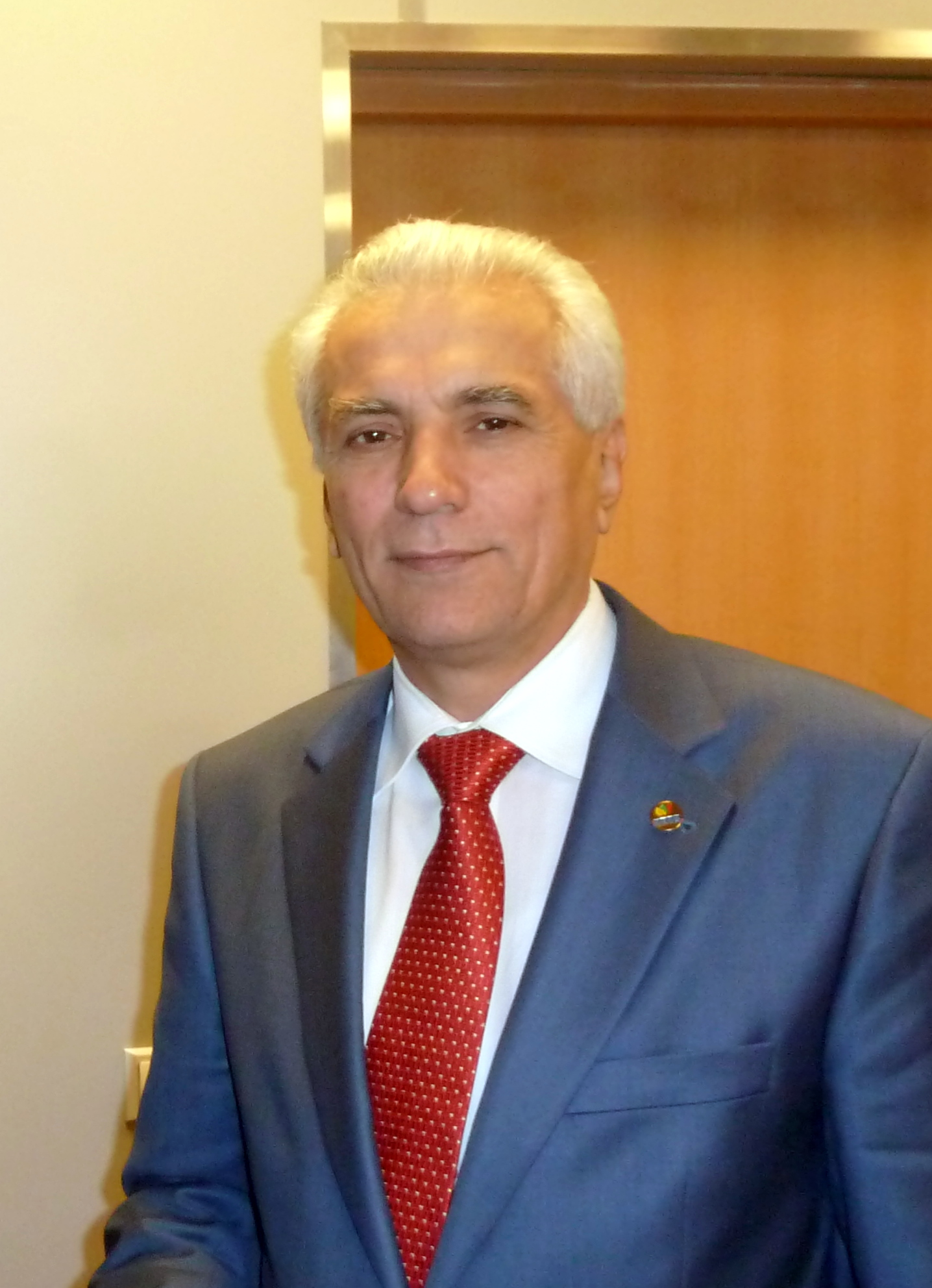 Tadžikistani välisminister Hamrohhon Zarifi Vilniuses Тоҷикӣ: Ҳамрохон Зарифӣ